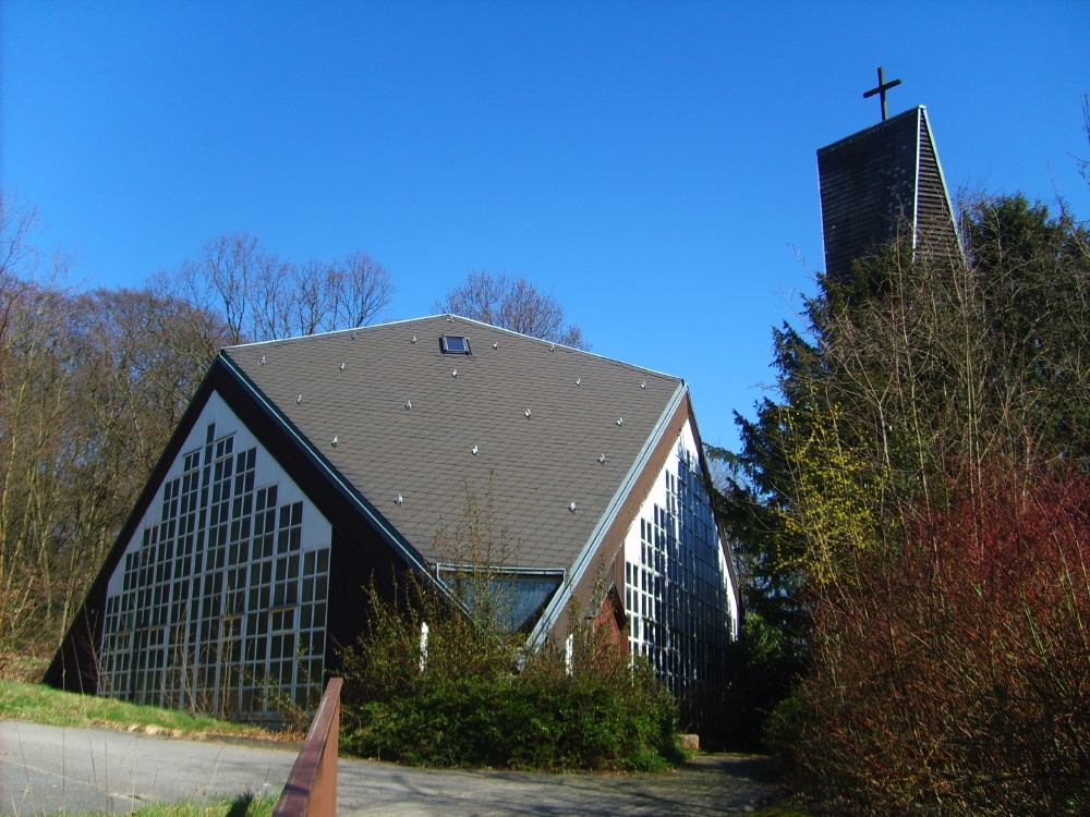 Ehemalige Matthäuskirche, Uellendahl, Wuppertal, Germany